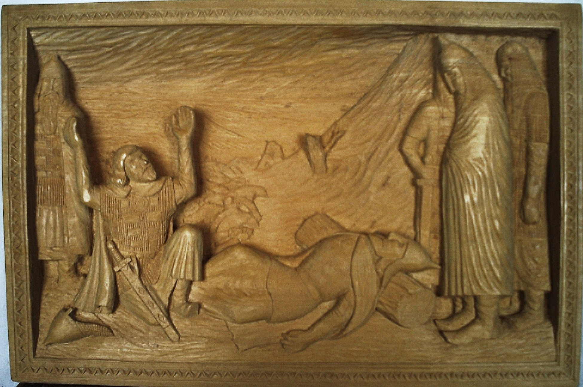 В 977р. військо київського князя Ярополка здійснило напад на місто Овруч. Овруцький надільний князь Олег загинув. Його брат київський князь Ярополк шкодував що став причиною братової смерті. Він докоряв воєводі Свенельду котрий підмовляв його піти війною на брата. Певне - так Свенельд помстився за смерть сина, котрого Олег вбив під час полювання на турів. (див. "Олег Святославович вбиває Люта".)